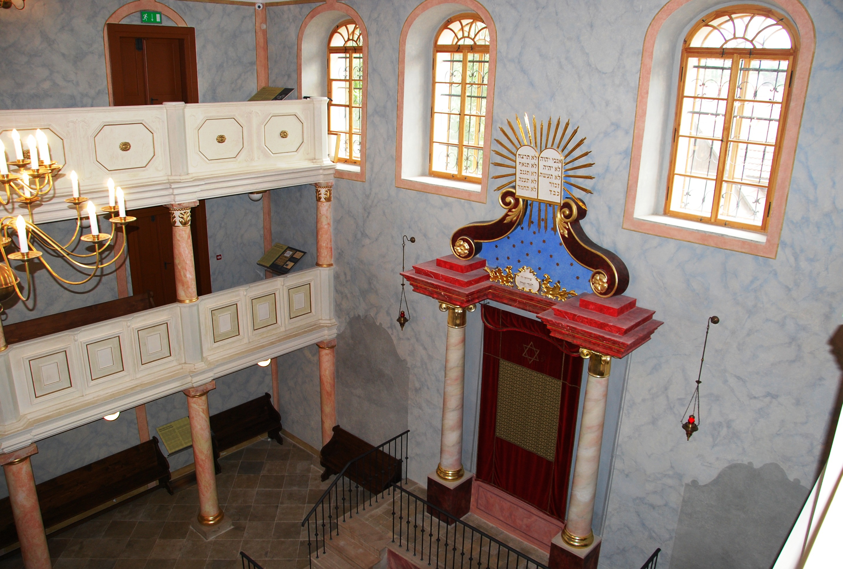 Židovský hřbitov, Kostelecká, Brandýs nad Labem.